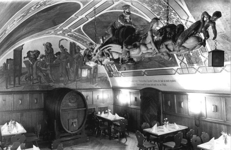 Leipzig, Auerbachs Keller, Gastraum ADN-ZB Gahlbeck 8.9.88-pr-Leipzig: Die historische Gaststätte "Auerbachs Keller" erstrahlt in neuem Glanz und bietet in verschiedenen Räumlichkeiten - hier der Faßkeller - angenehmen Aufenthalt für in- und ausländische Gäste.